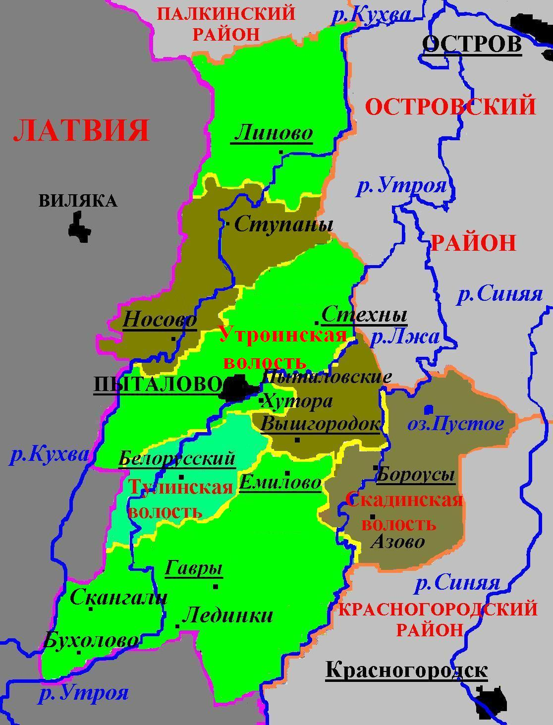 Пыталовский район. Административная карта с изменениями по 984-ОЗ от 03.06.2010 и 1032-ОЗ от 22.12.2010